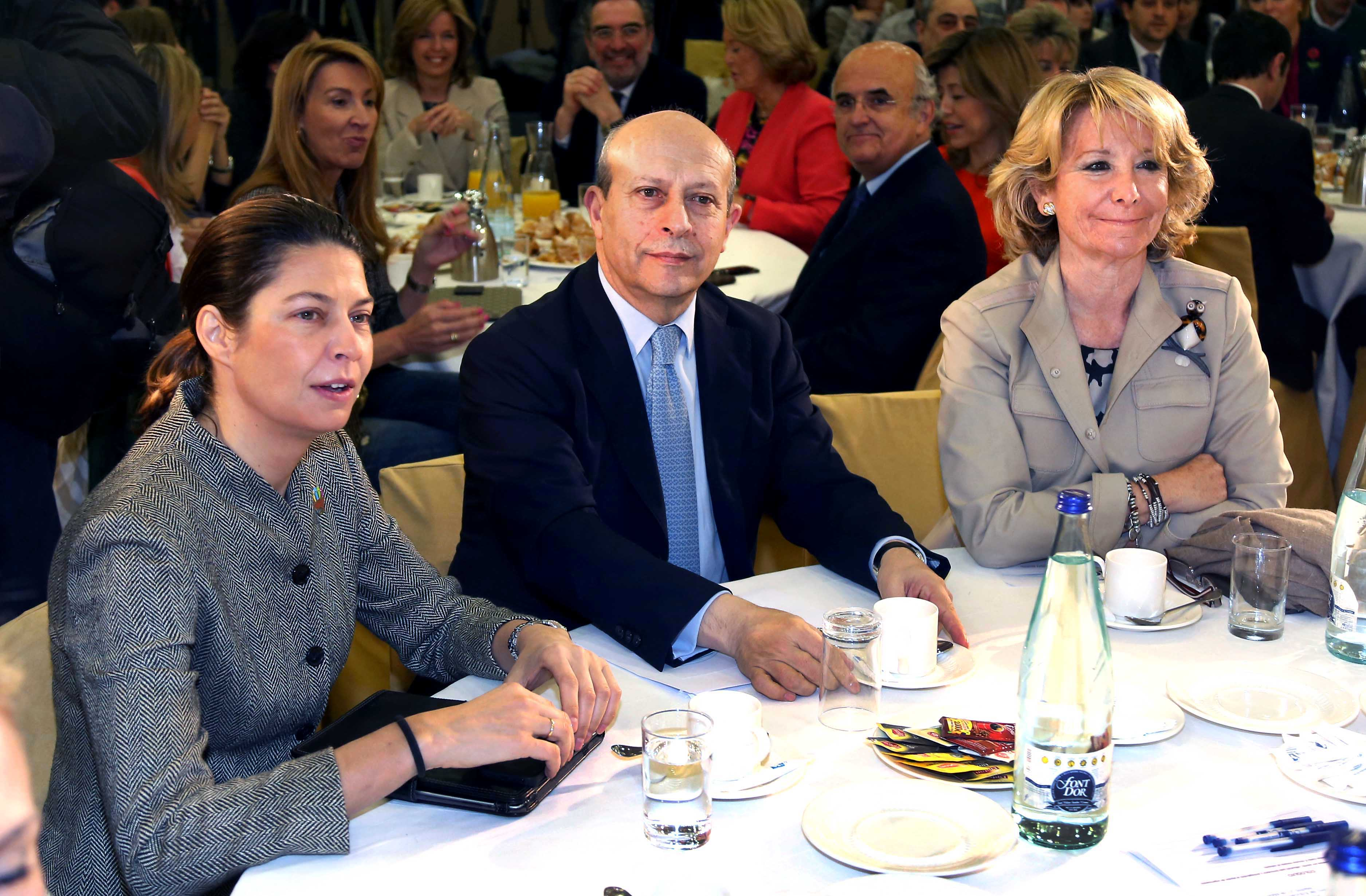 La presidenta junto al ministro de Educación y su homóloga en la Comunidad de Madrid